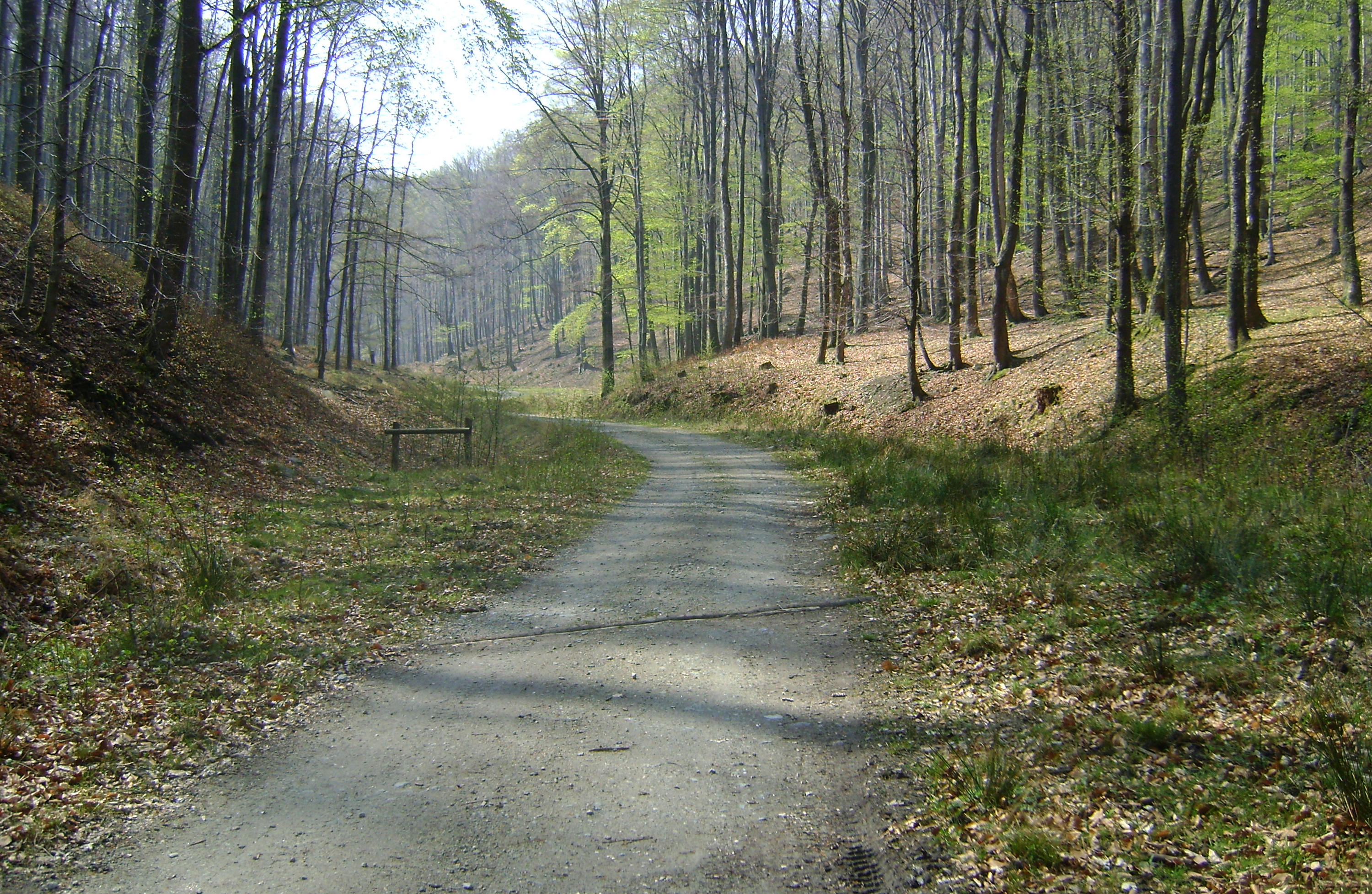 Dolina górska w Sudetach Środkowych w Górach Sowich, w woj. dolnośląskim. Widok na dolinę od strony północno-wschodniej.